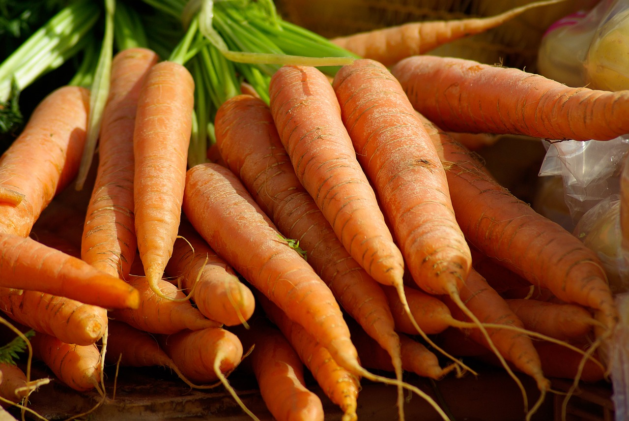 Zanahorias expuestas en el mercado de Vic